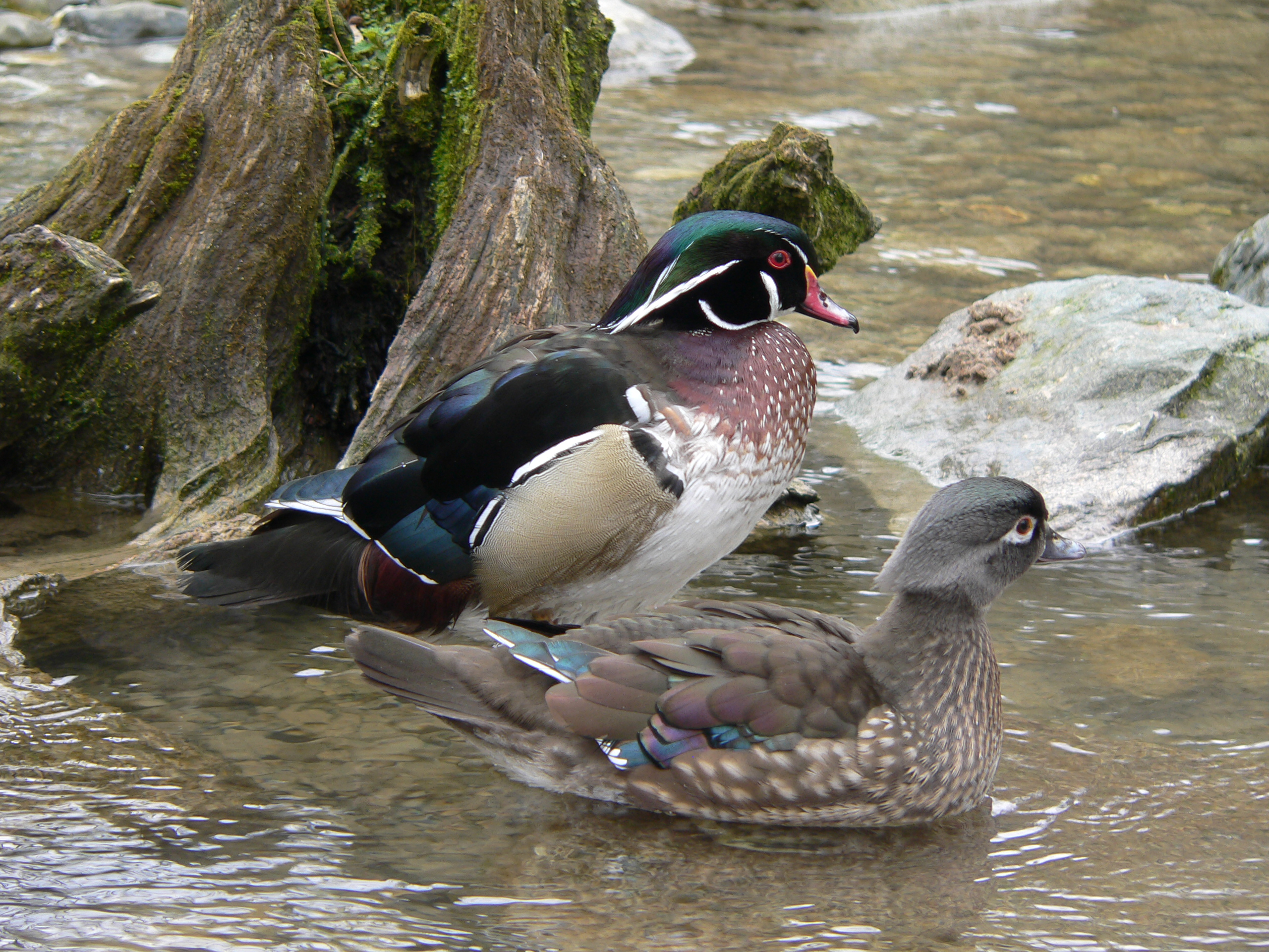 Brautentenpaar